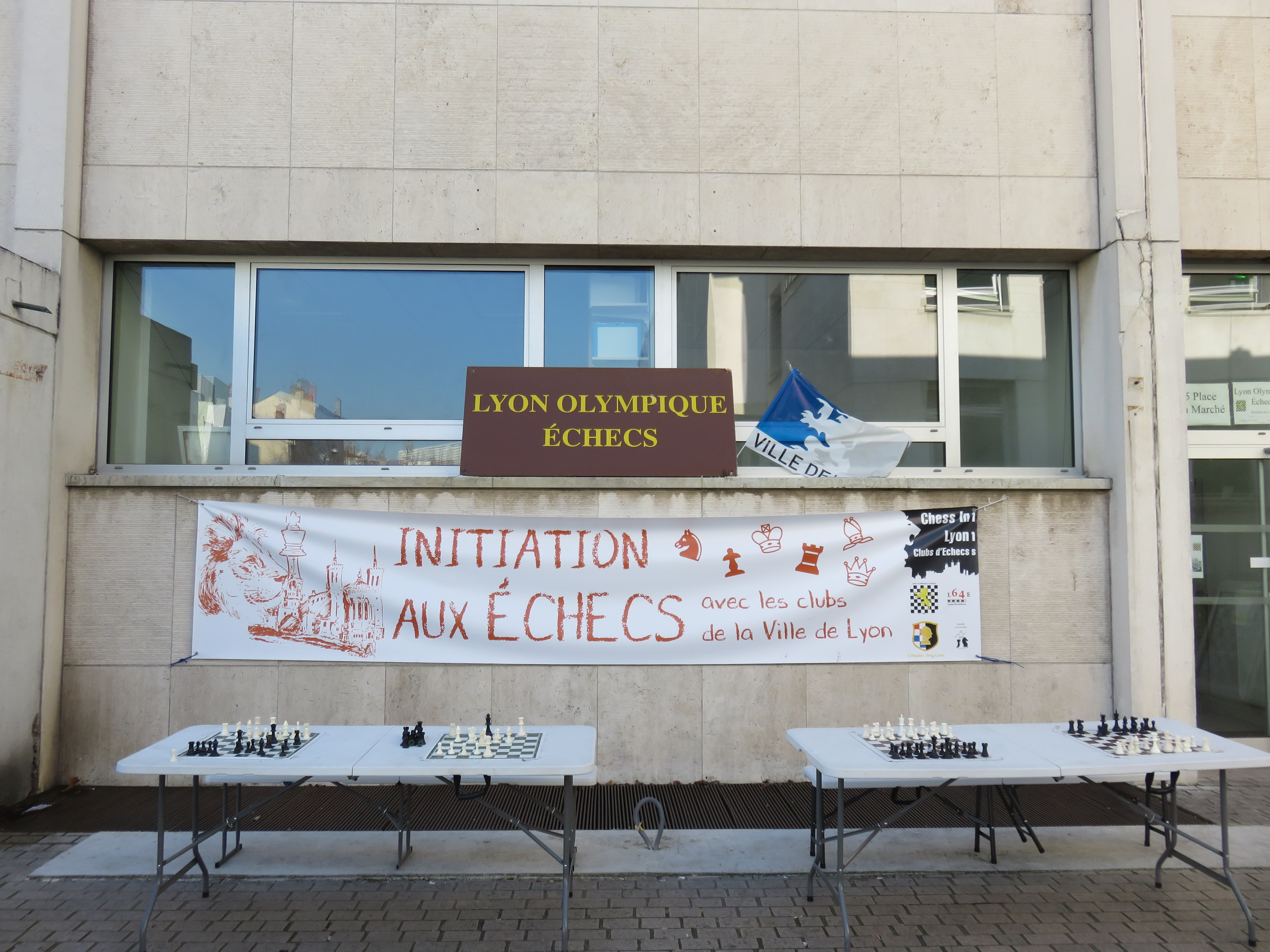 Initiation aux échecs organisée par le Lyon Olympique Échecs, place du Marché, dans le 9e arrondissement de Lyon.